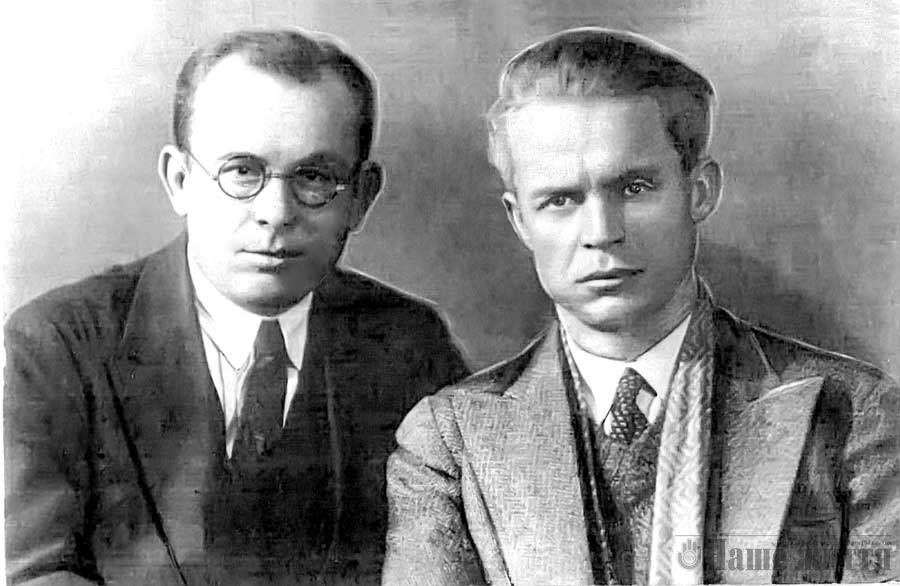 Олександр Довженко (праворуч) та Іван Соколянський.